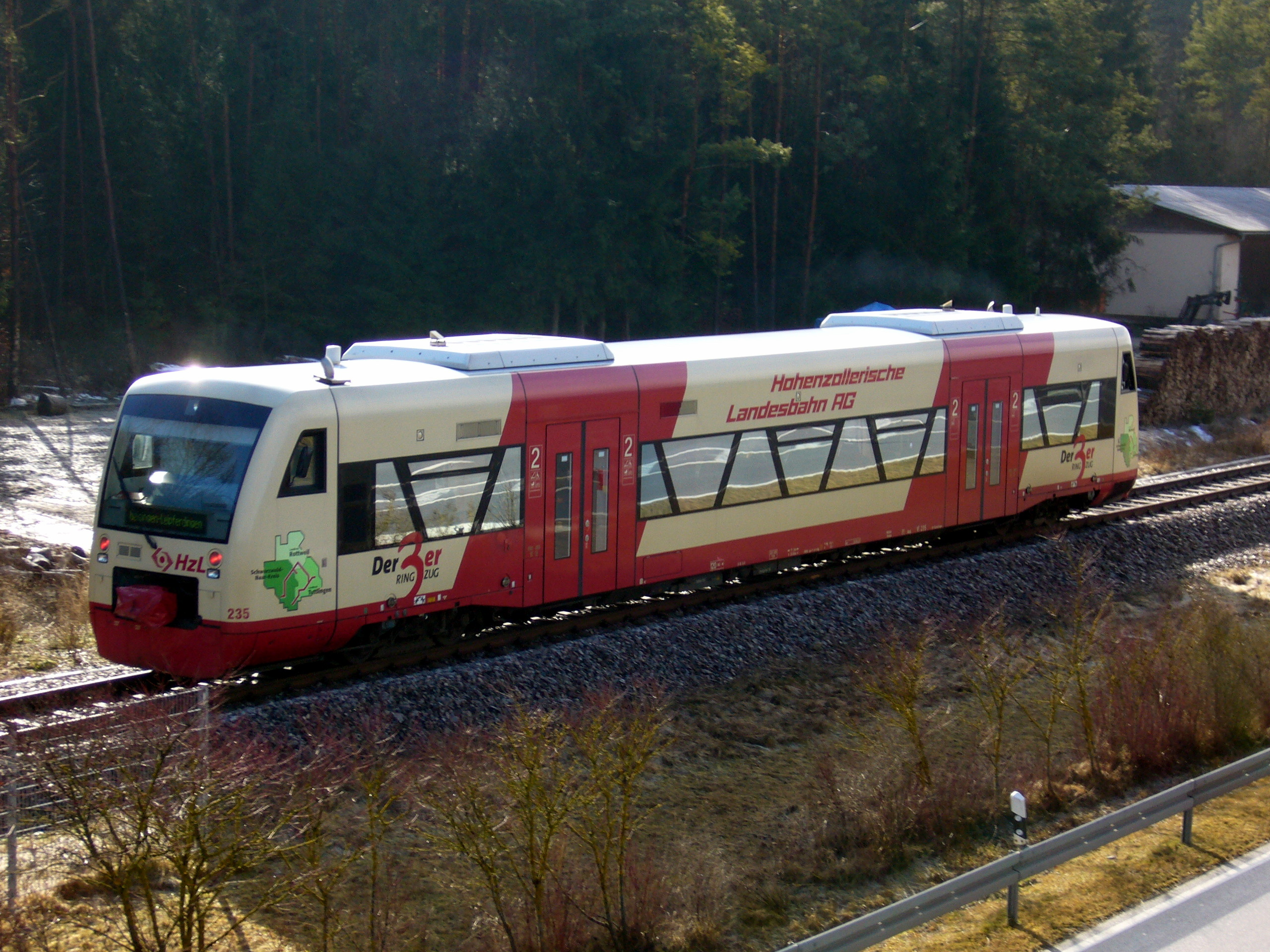 Ringzug (Stadler Regio-Shuttle RS1) auf der Wutachtalbahn photographiert von der Bahnüberquerung beim Haltepunkt Geisingen-Kirchen, Ringzug mit Fahrtziel Geisingen-Leipferdingen